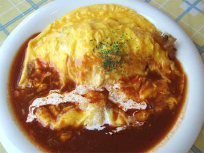 オムライス